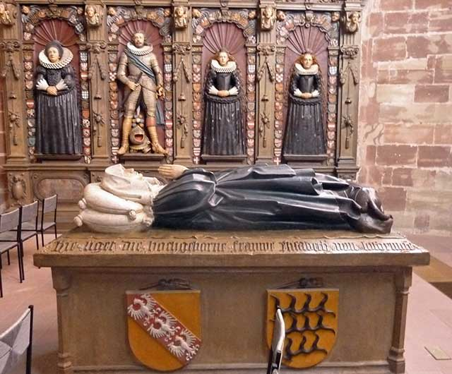 De graftombe van Elisabeth van Lotharingen en het grafmonument voor Anna Maria van Hessen-Kassel en haar kinderen in de Stiftskirche Sankt Arnual te Saarbrücken